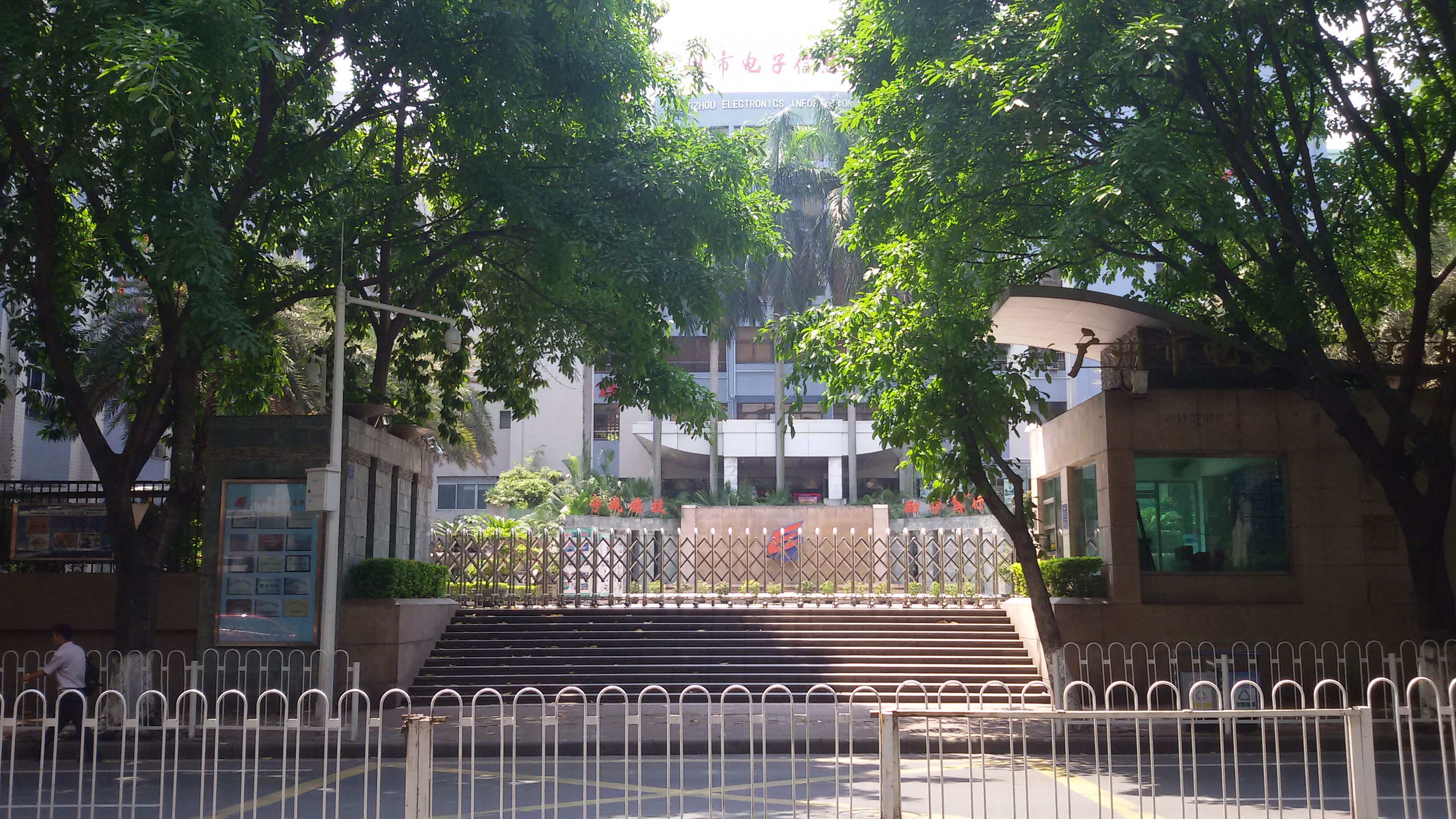 粵語: 廣州市電子信息學校嘅正門